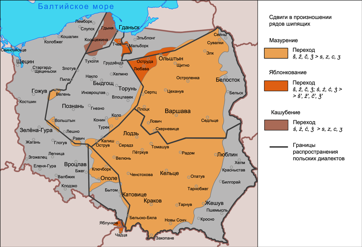 Карта распространения сдвигов в произношении шипящих (мазурения, яблонкования и кашубения) в польских диалектах. Источники: Gwary polskie. Przewodnik multimedialny pod redakcją Haliny Karaś. Leksykon. Mazurzenie Handke K. Terytorialne odmiany polszczyzny // Współczesny język polski / pod redakcją J. Bartmińskiego. — Lublin: Uniwersytet Marii Curie-Skłodowskiej, 2001 — С. 205.